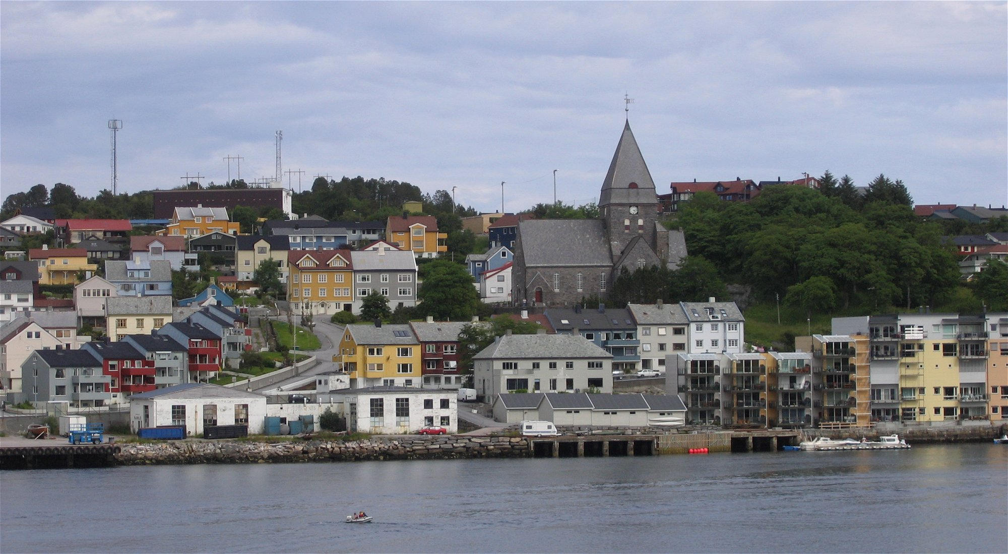 Kristiansund, Norwegen